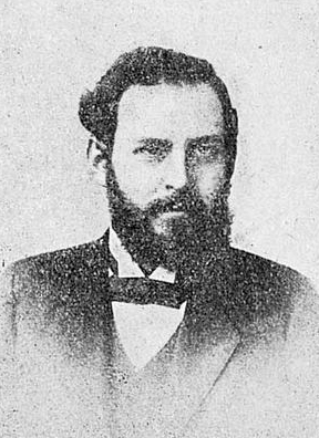 Владимир Александрович Базаров (1874-1939) русский философ и экономист